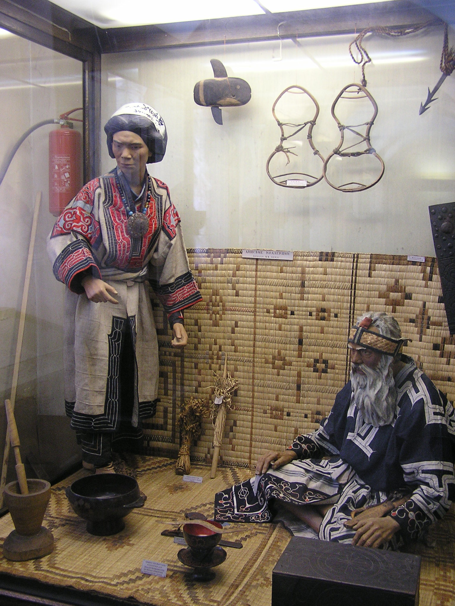 Санкт-Петербург. Музей антропологии и этнографии имени Петра Великого Российской академии наук (Кунсткамера). Айны